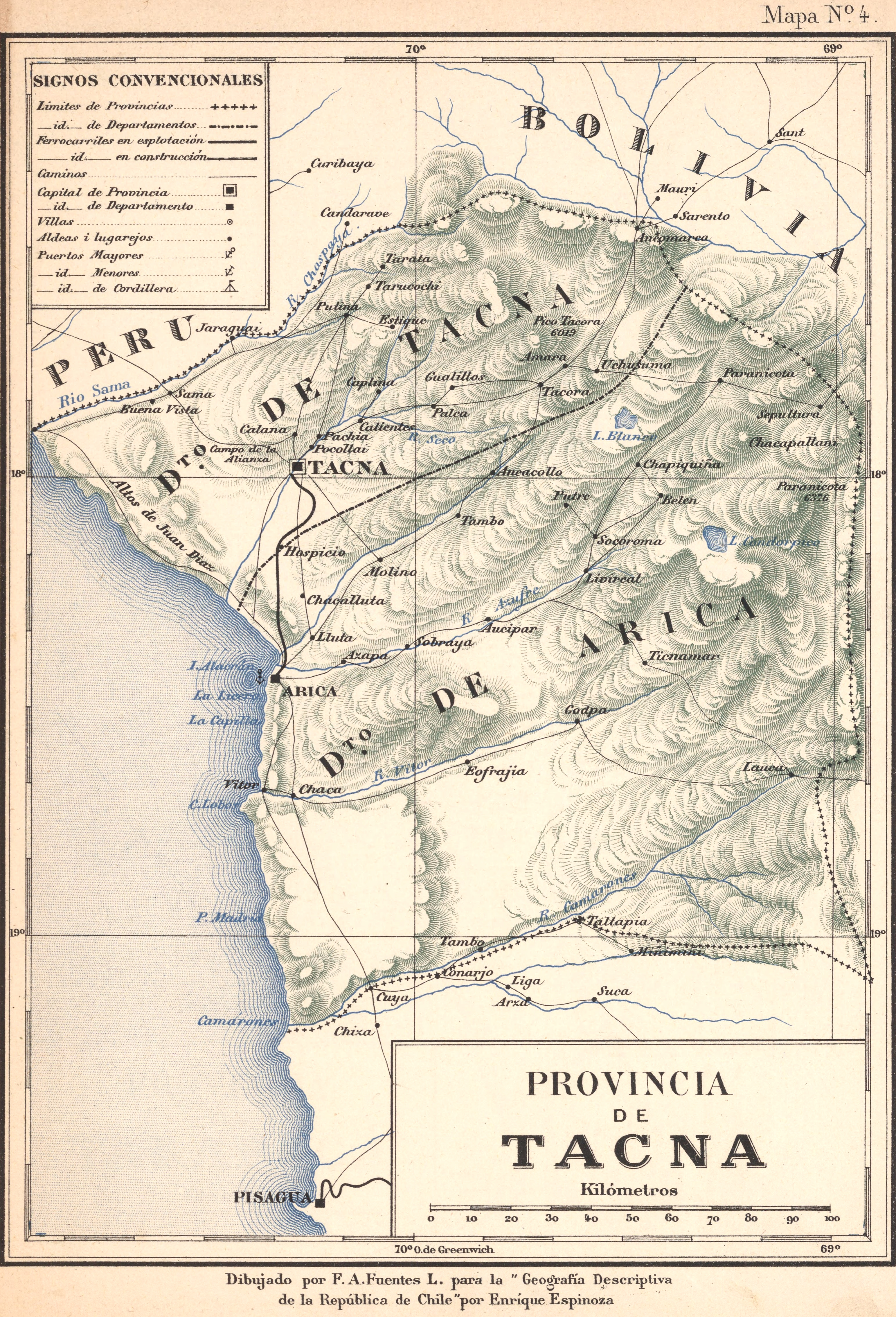 Mapa de la antigua Provincia chilena de Tacna, hacia 1895, que se dividía en los Departamentos de Tacna y Arica, actuales Provincia de Tacna y Tarata, Departamento de Tacna (Perú) y Provincia de Arica y Parinacota, XV Región de Arica y Parinacota (Chile)